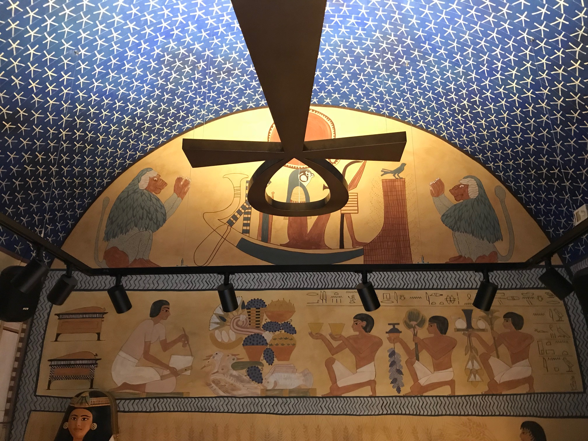 Tartu Ülikooli kunstimuuseumi muumiakamber